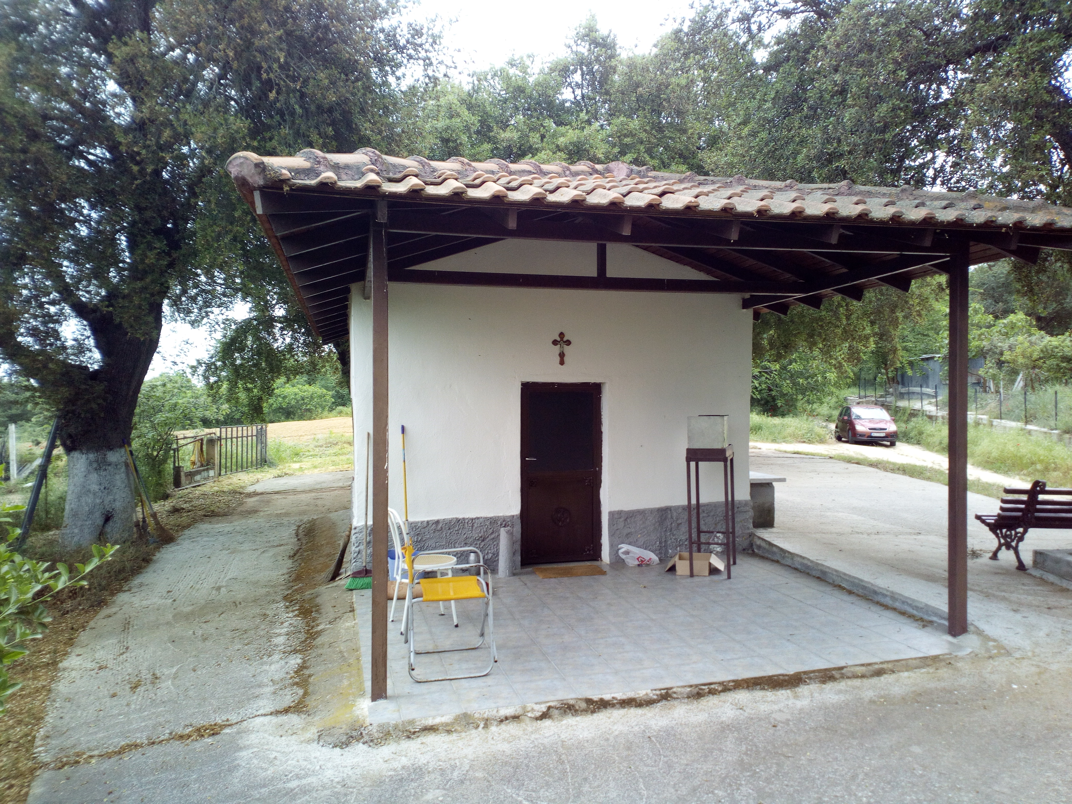 Εκκλησάκι με βρύση.